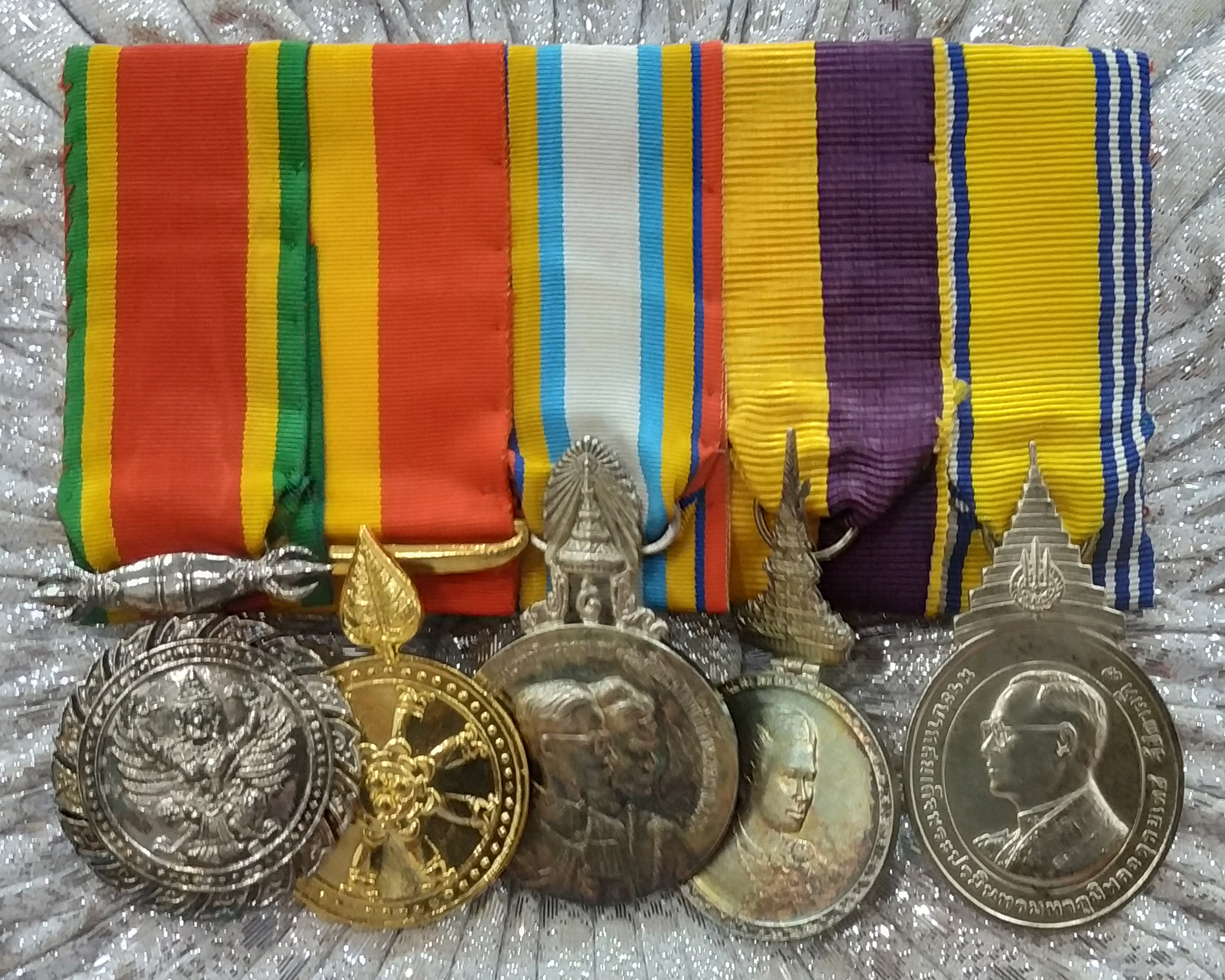 เหรียญจักรพรรดิมาลา (ซ้ายสุด) และเหรียญราชอิสริยาภรณ์ที่ระลึกต่างๆ ของไทย (จากซ้าย) เหรียญงานฉลอง ๒๕ พุทธศตวรรษ, เหรียญที่ระลึกพระบาทสมเด็จพระปรมินทรมหาภูมิพลอดุลยเดช ในการเสด็จพระราชดำเนินเยือนสหรัฐอเมริกาและทวีปยุโรป, เหรียญที่ระลึกพระราชพิธีสถาปนาสมเด็จพระเทพรัตนราชสุดาฯ สยามบรมราชกุมารี และเหรียญที่ระลึกเฉลิมพระเกียรติพระบาทสมเด็จพระปรมินทรมหาภูมิพลอดุลยเดช เนื่องในพระราชพิธีฉลองสิริราชสมบัติครบ ๖๐ ปี